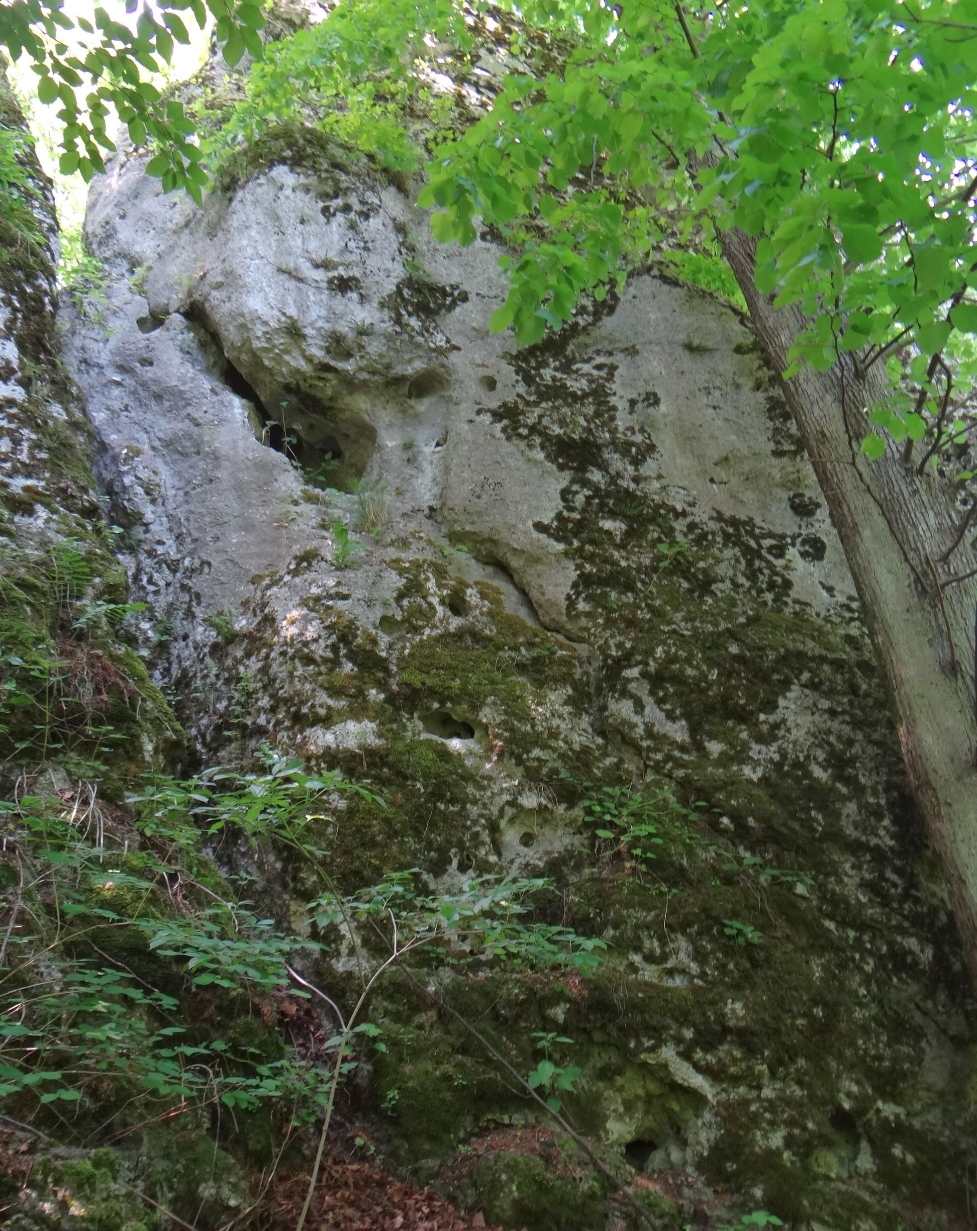 Rura w Skale Oczko